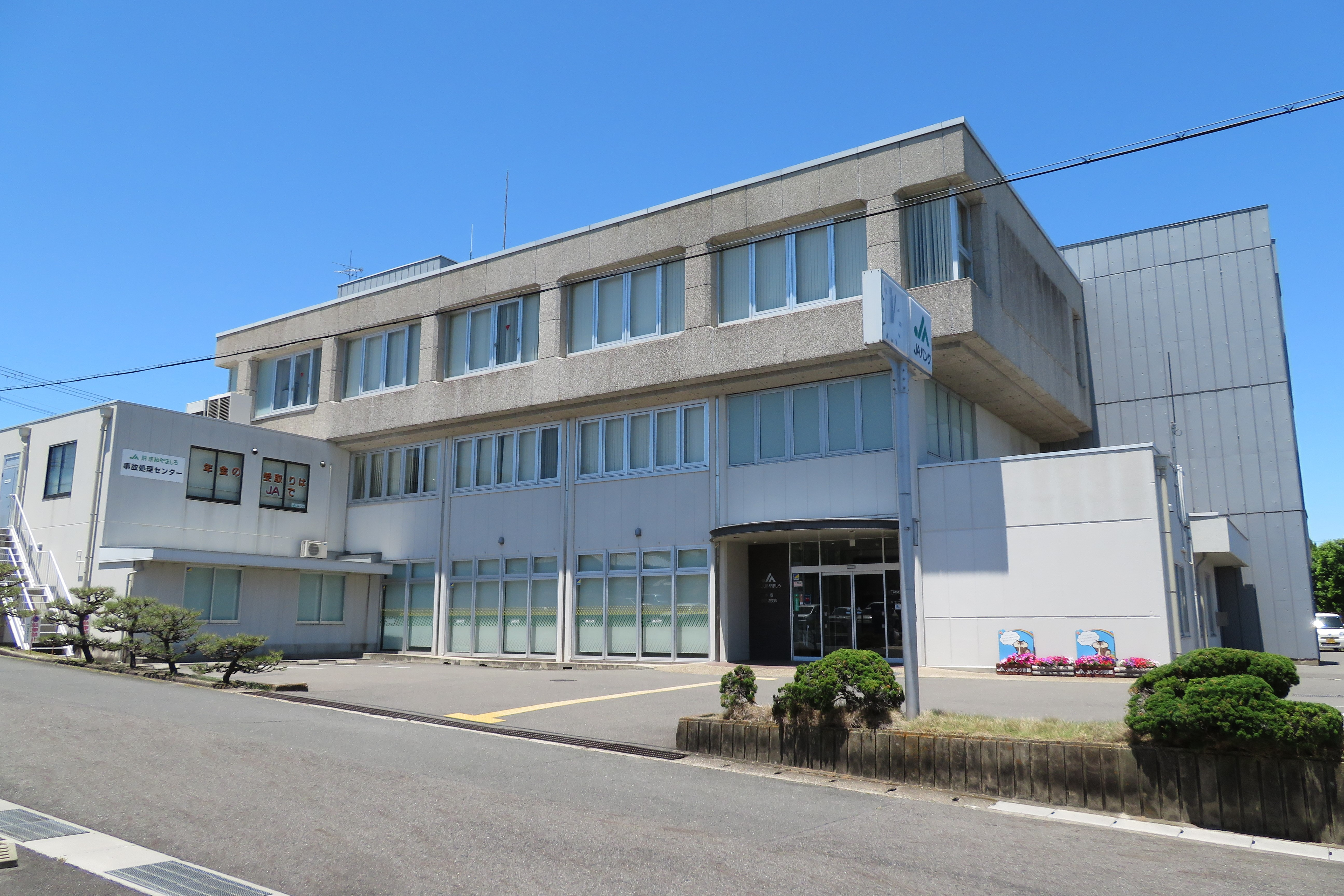 京都やましろ農業協同組合本店